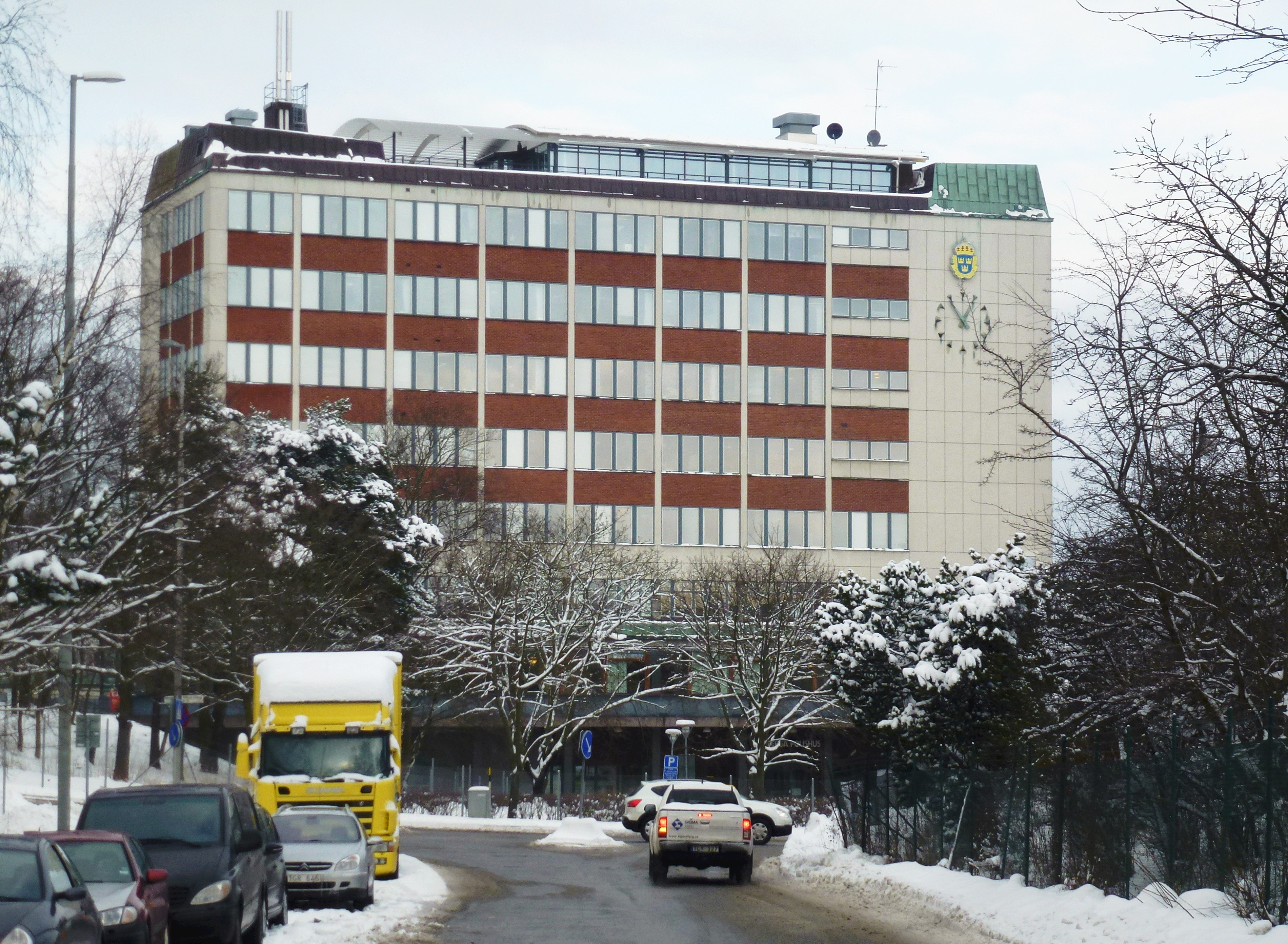 F.d. Västberga gymnasium, numera Västberga polishus